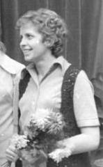 Title: Berlin, Sportler des Jahres geehrt People in the image: Köste, Klaus: Leichtathlet, Turner, DDR Factual corrections and alternative descriptions are encouraged separately from the original description. Additionally errors can be reported at this page to inform the Bundesarchiv. Original historic description: ADN-ZB-Katscherowski-20.12.72-Sue-Berlin :Sportler des Jahres geehrt-Im Kinosaal des Fernsehturms am Alexanderplatz wurden am 20.12.72 die durch die Sportlerumfrage der "Jungen Welt" für 1972 ermittelten "DDR- Sportler des Jahres" geehrt. V.l.n.r.: Helga Seidler, Wolfgang Nordwig, Rita Kühne, Renate Stecher, Klaus Köste, Roland Matthas, Monika Zehrt, Kornelia Ender und Dagmar Luenenschloß-Käsling. (Weiteres siehe ADN-Meldg.)